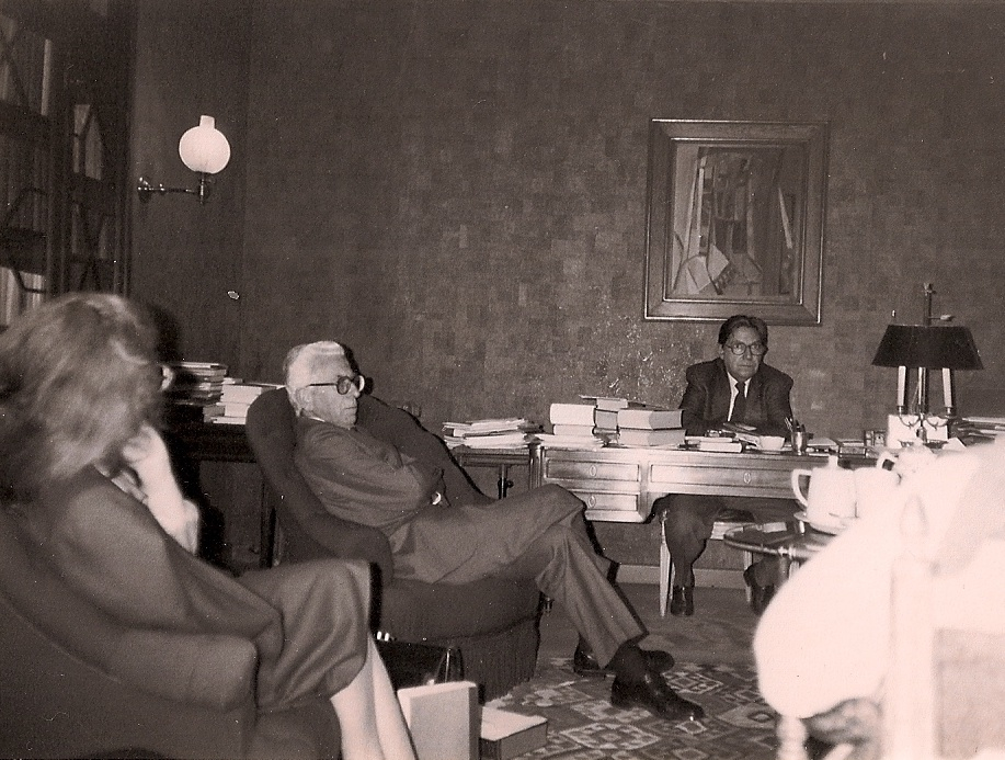 Groupe de traduction Laplanche